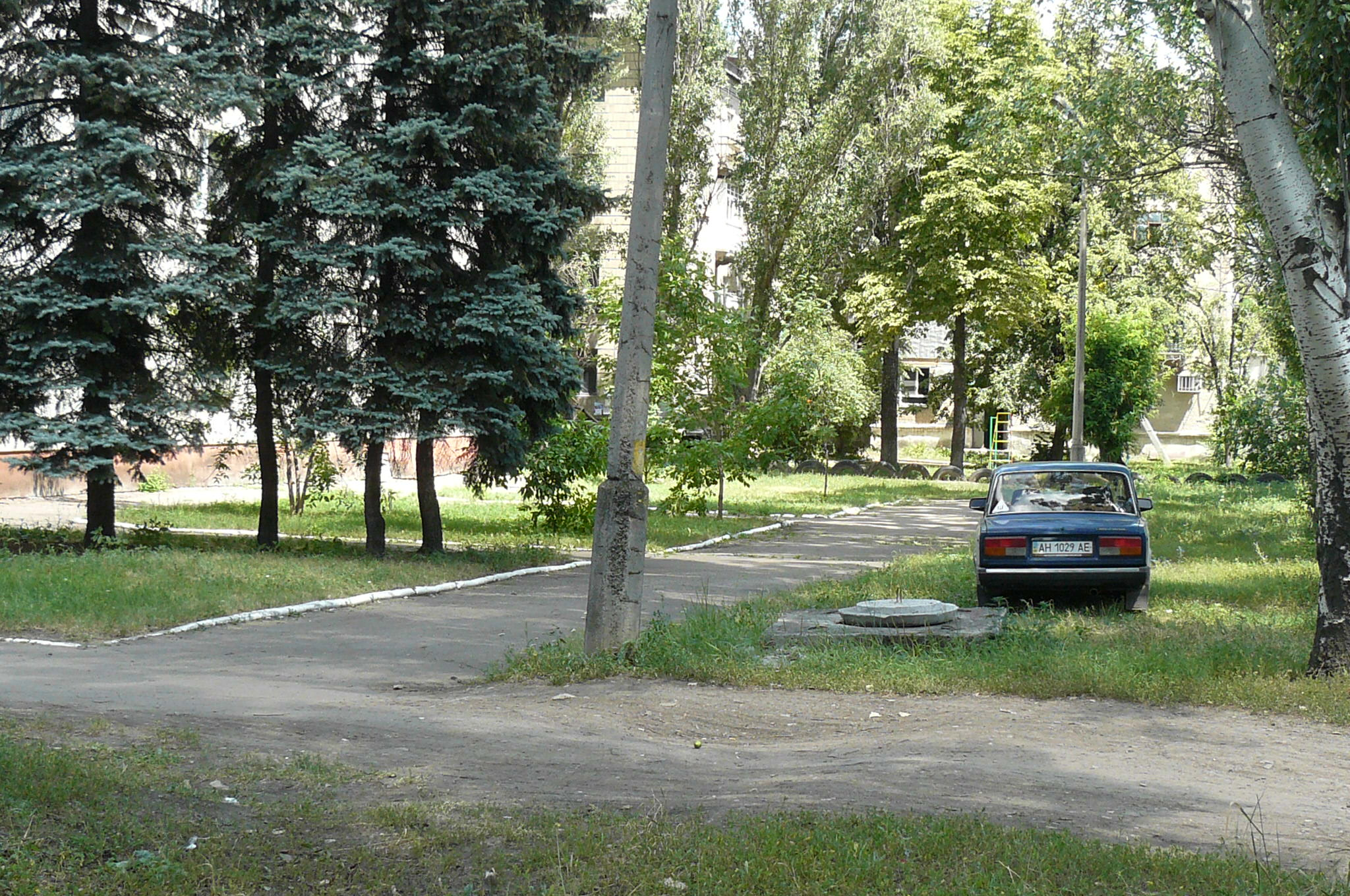 Krasnoarmijsk, centrum miasta.